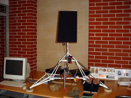 Hunveyor-1 modellje az ELTE TTK-n